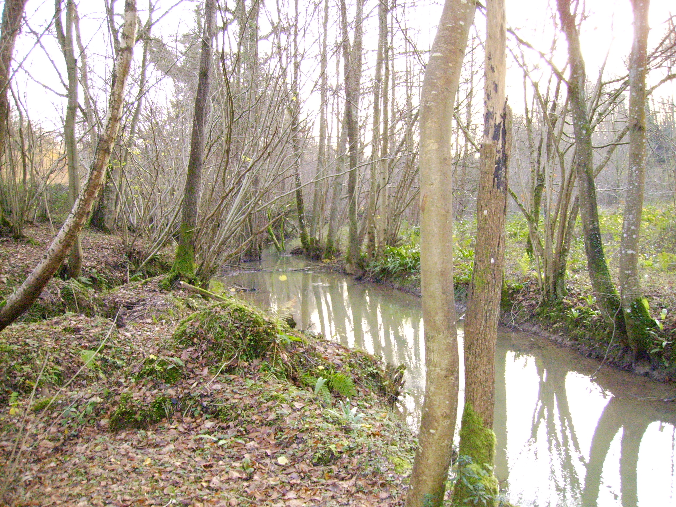 Rivière d'Angerville (27 Eure)